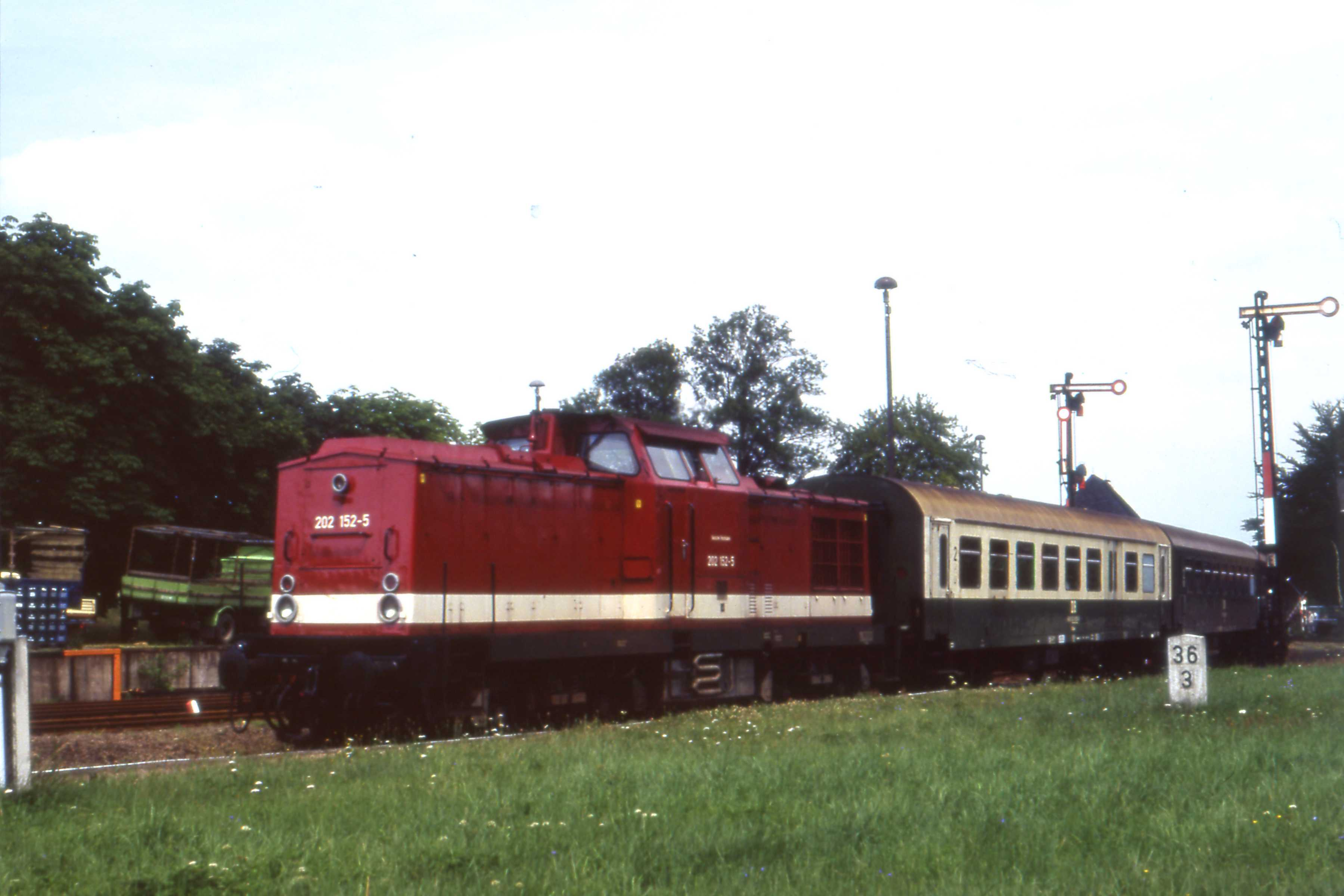 A personenzug from Chemnitz to Aue departs Zwönitz.